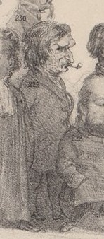 Le goguettier Charles Gilles caricaturé par Nadar.